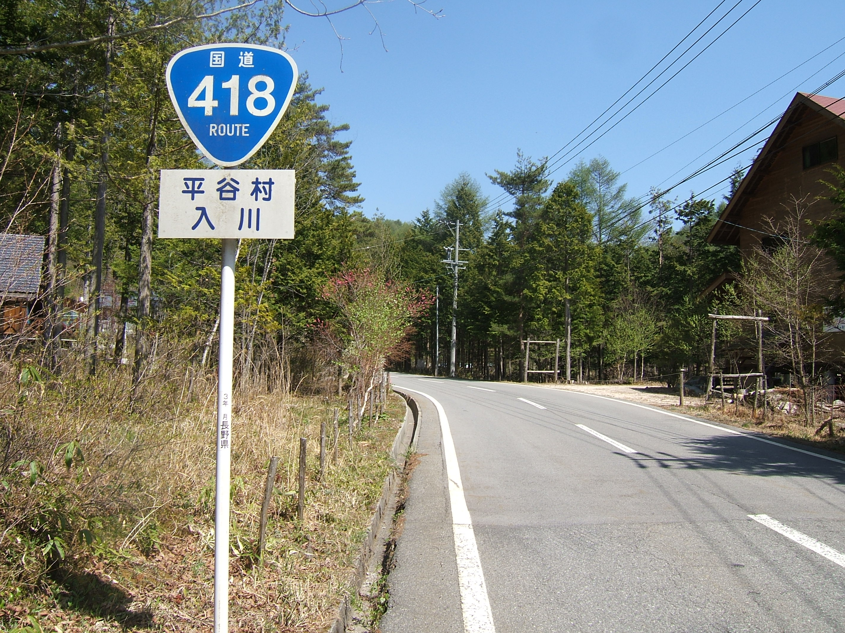 長野県下伊那郡平谷村の国道418号。